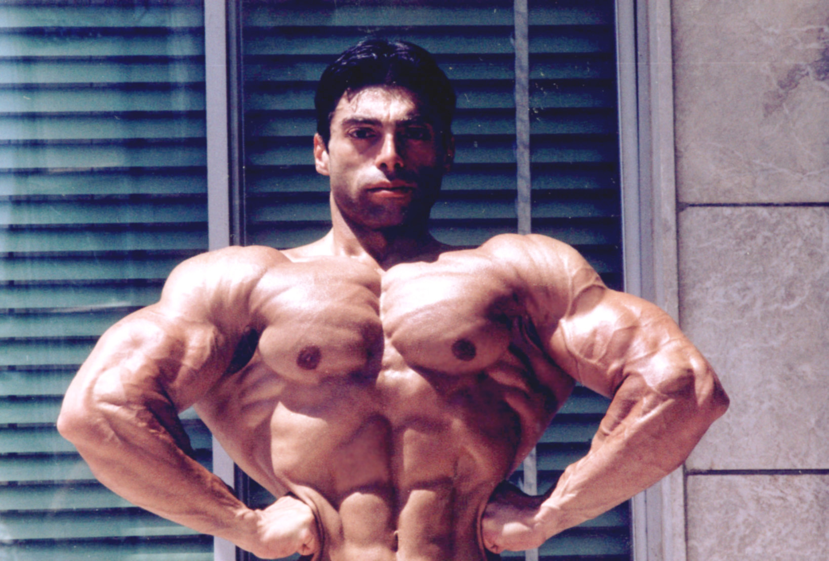 سامان سرابی - تابستان 1378